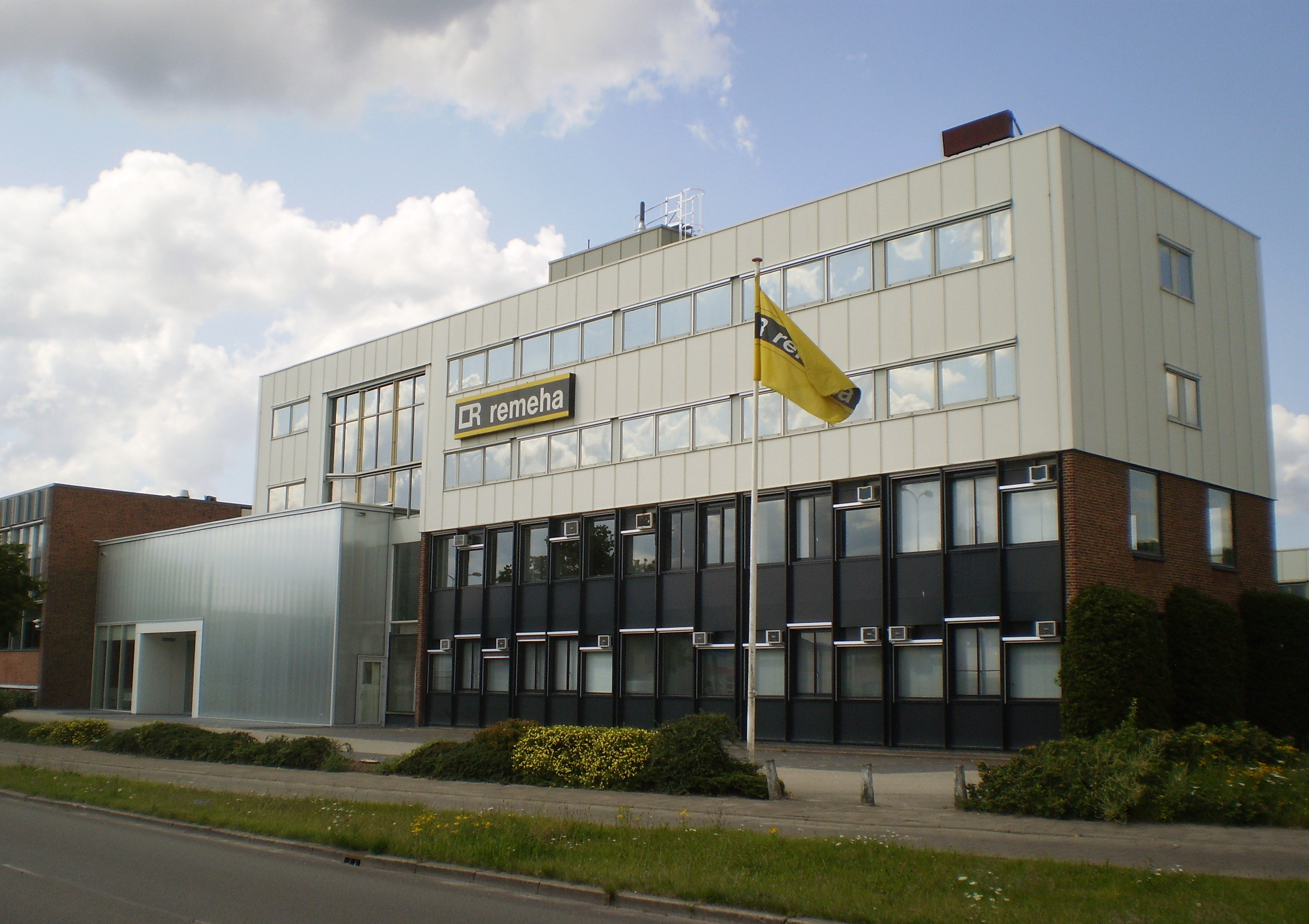 Gebouw van Remeha, onderneming in verwarmingstoepassingen te Apeldoorn, NL